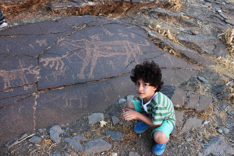 teimareh iran